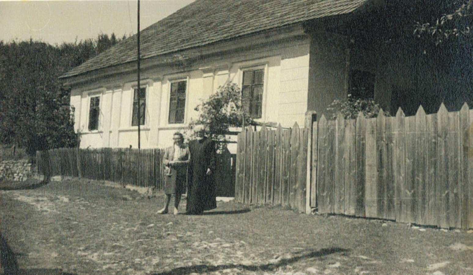 Casa in care s-a nascut E. Hodos. Pe unul din pereti este inscris: "S-a ridicatu aceste case parochiale prin stăruinta si interventia parochului si protopopului Simeon cav. de Balint. Ne sin posteritas ingrata"